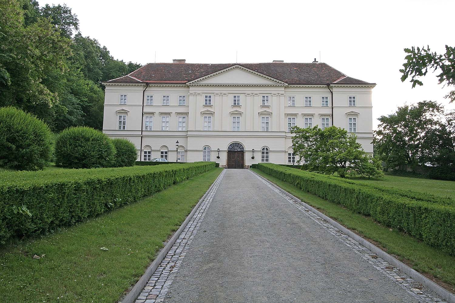 Zámek v Boskovicích